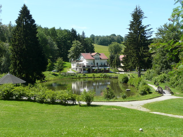 Sebnitz: Naherholungsgebiet an der Forellenschenke